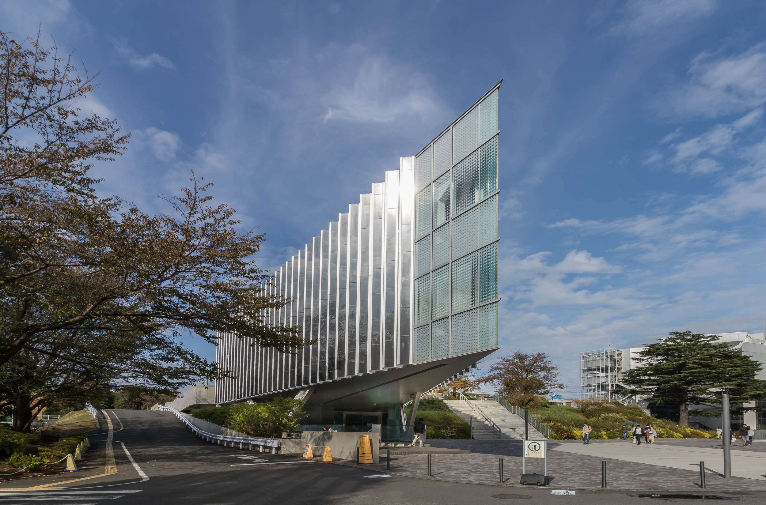 東京工業大学 大岡山キャンパス付属図書館。安田幸一研究室＋佐藤総合計画設計(2011)。BCS賞受賞(2013)。